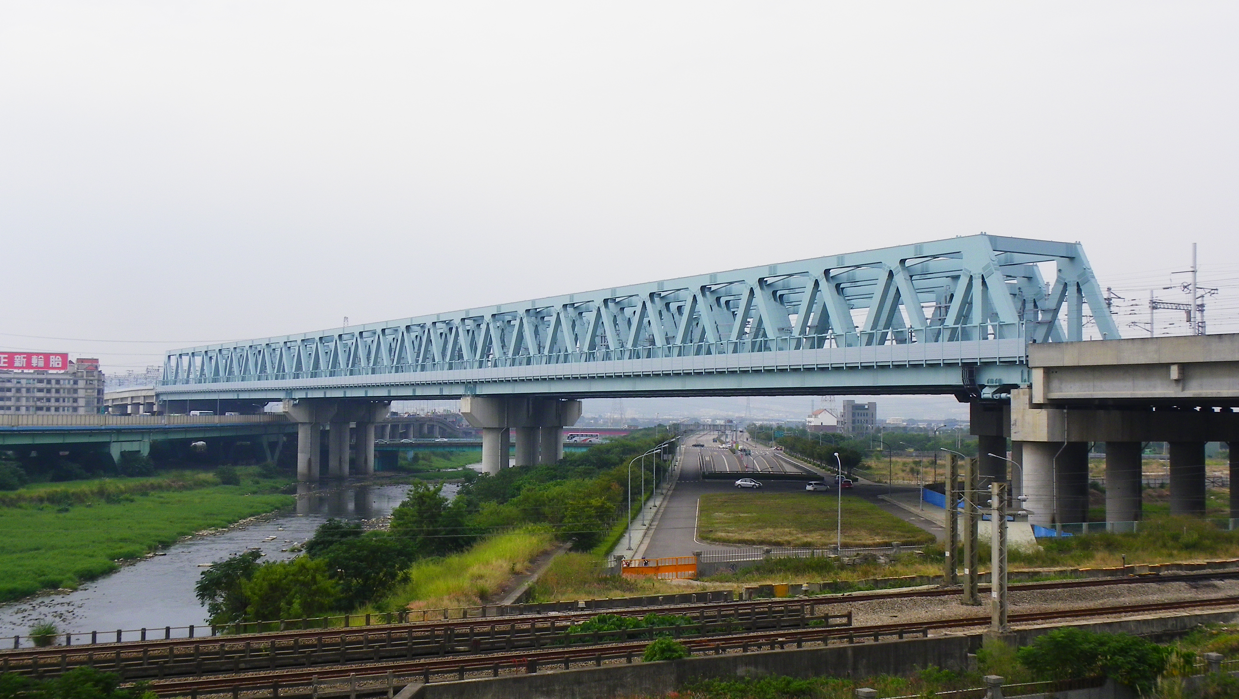 臺灣高鐵臺中站南橫越中山路三段（省道臺1乙線）與筏子溪的跨距鋼橋，前方是山線鐵路筏子溪橋，攝於臺中市烏日區建國路高架橋。